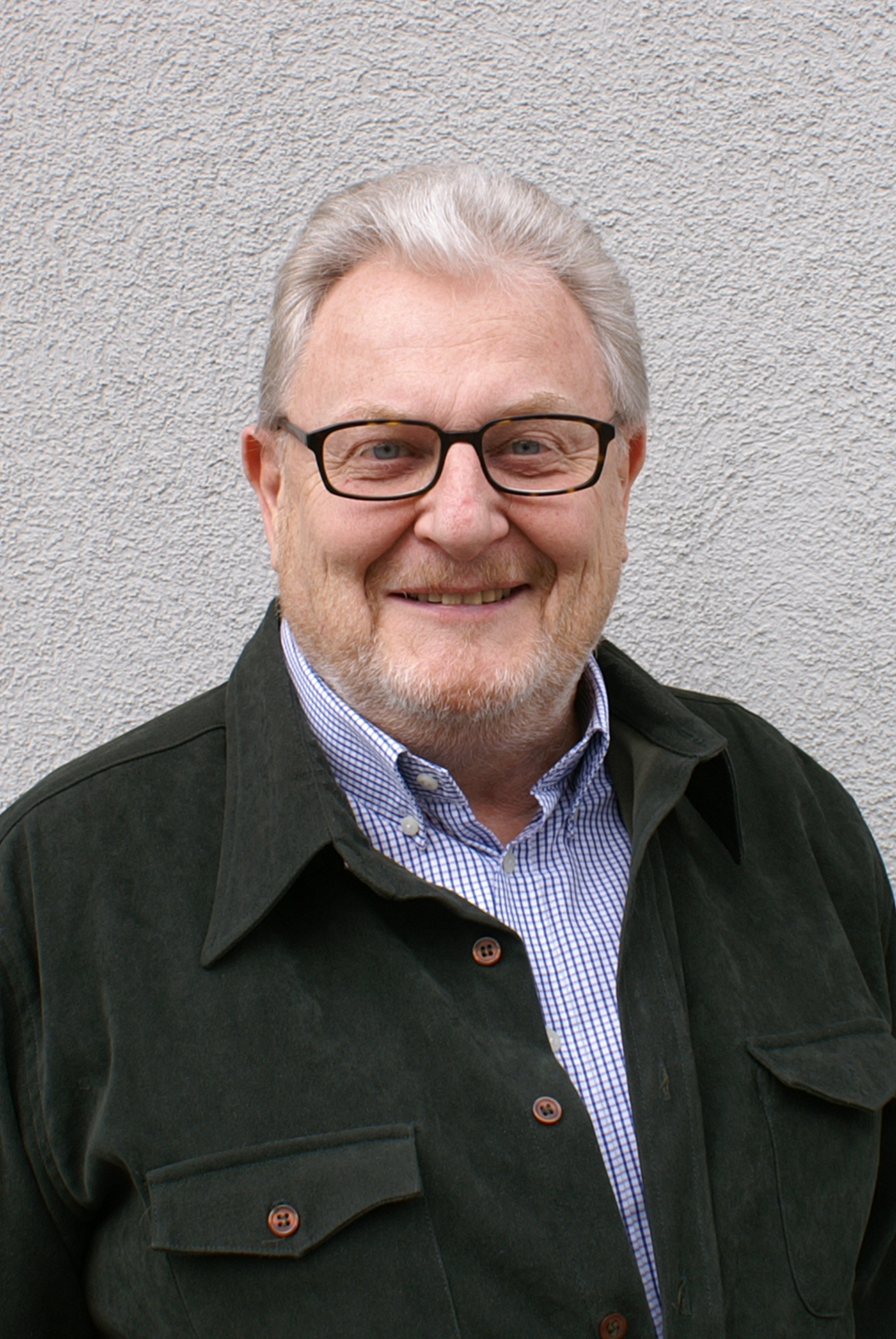 Graveur, Künstler und Grafiker aus Zürich